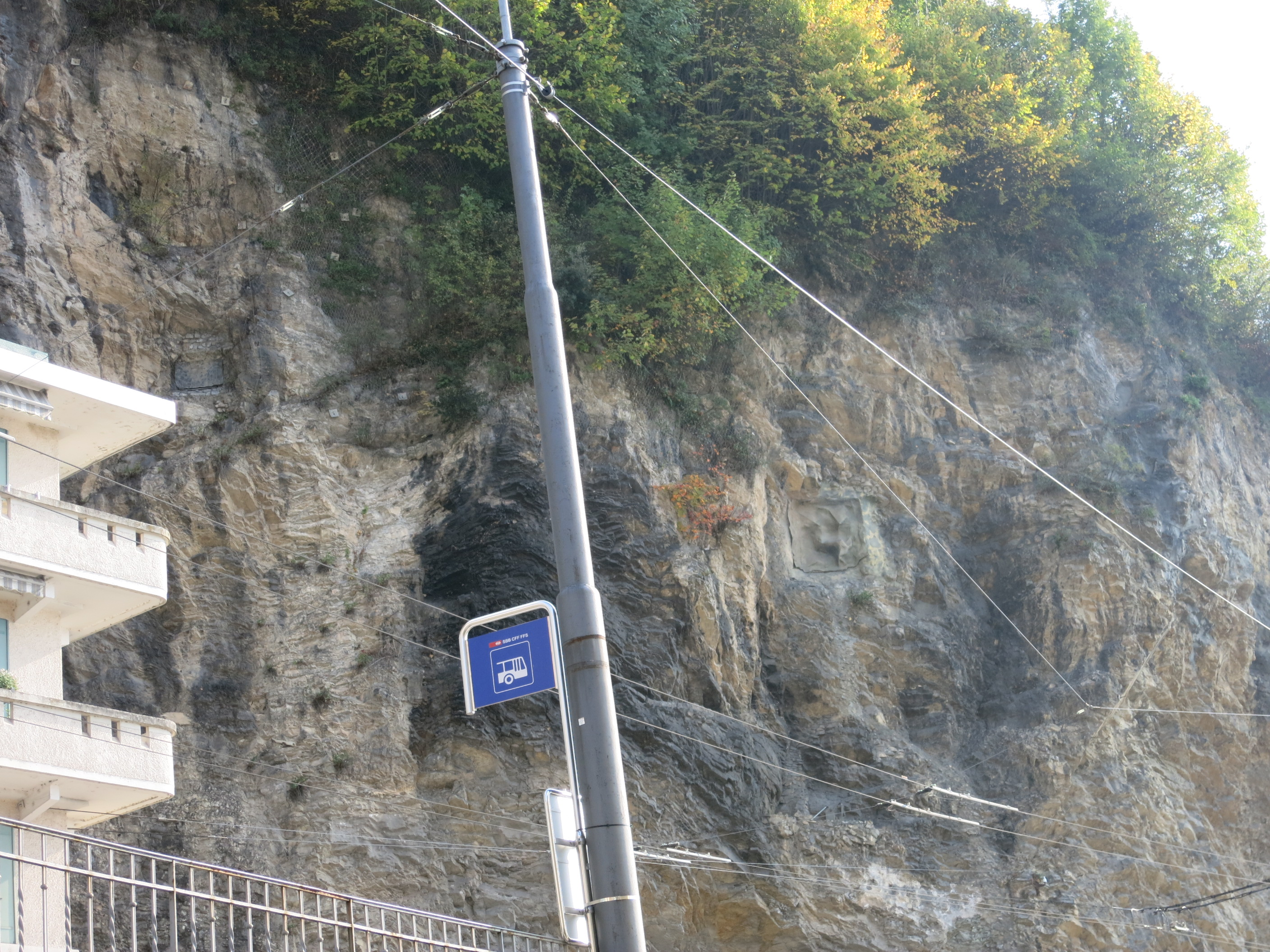 Sperrstelle Chillon VD, Schweiz